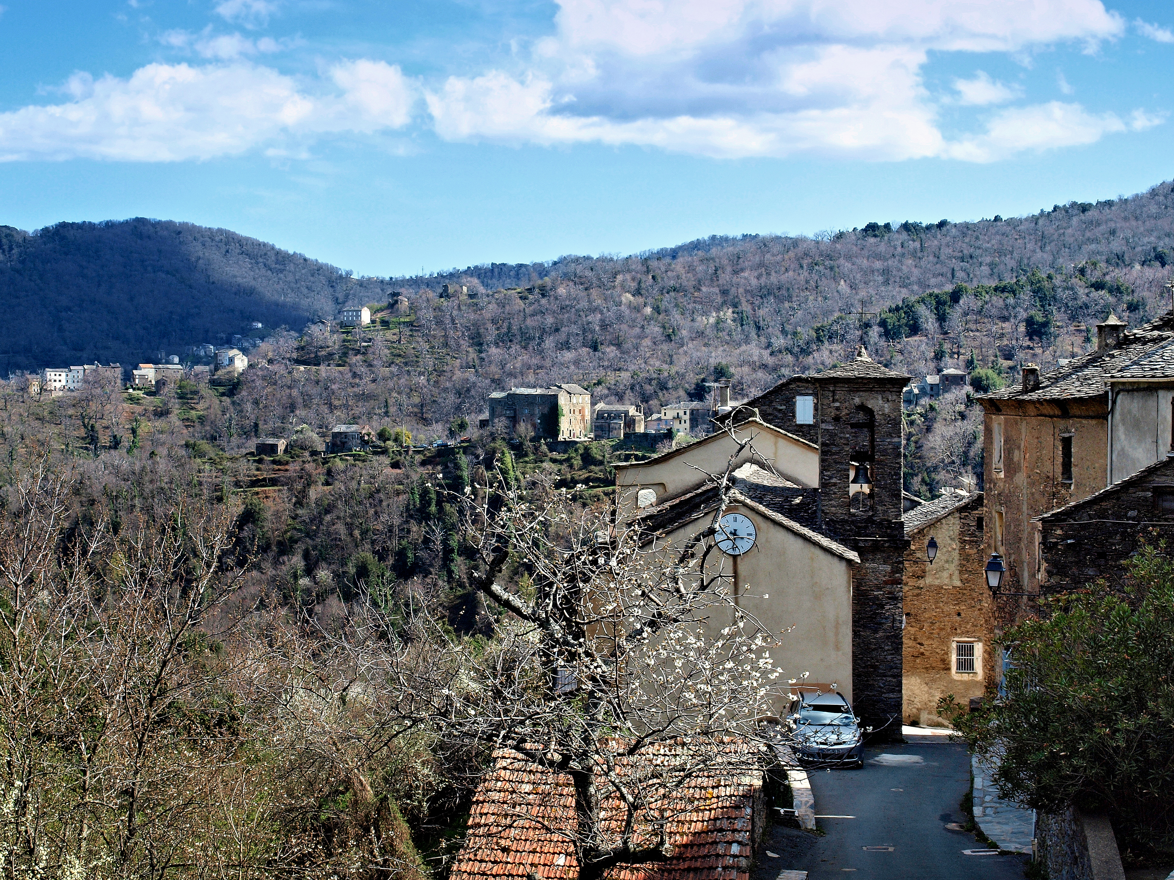 Pie-d'Orezza, Castagniccia (Corse) - Vue du village. En arrière-plan, les villages de Carpineto et de Carcheto-Brustico